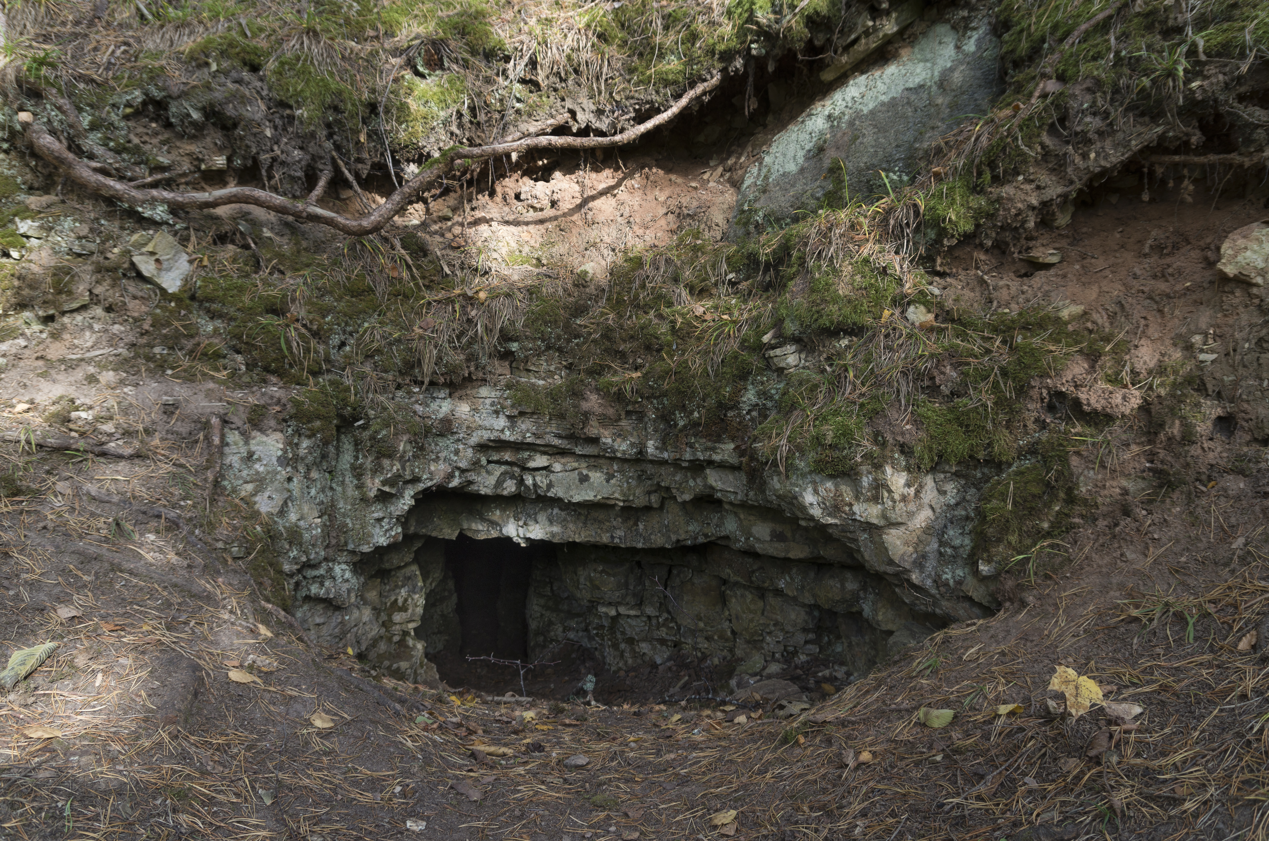 Bruņa ala, 04.10.2015.